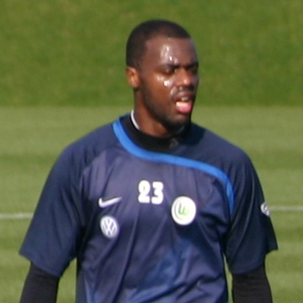 Grafite (VfL Wolfsburg) beim Training.